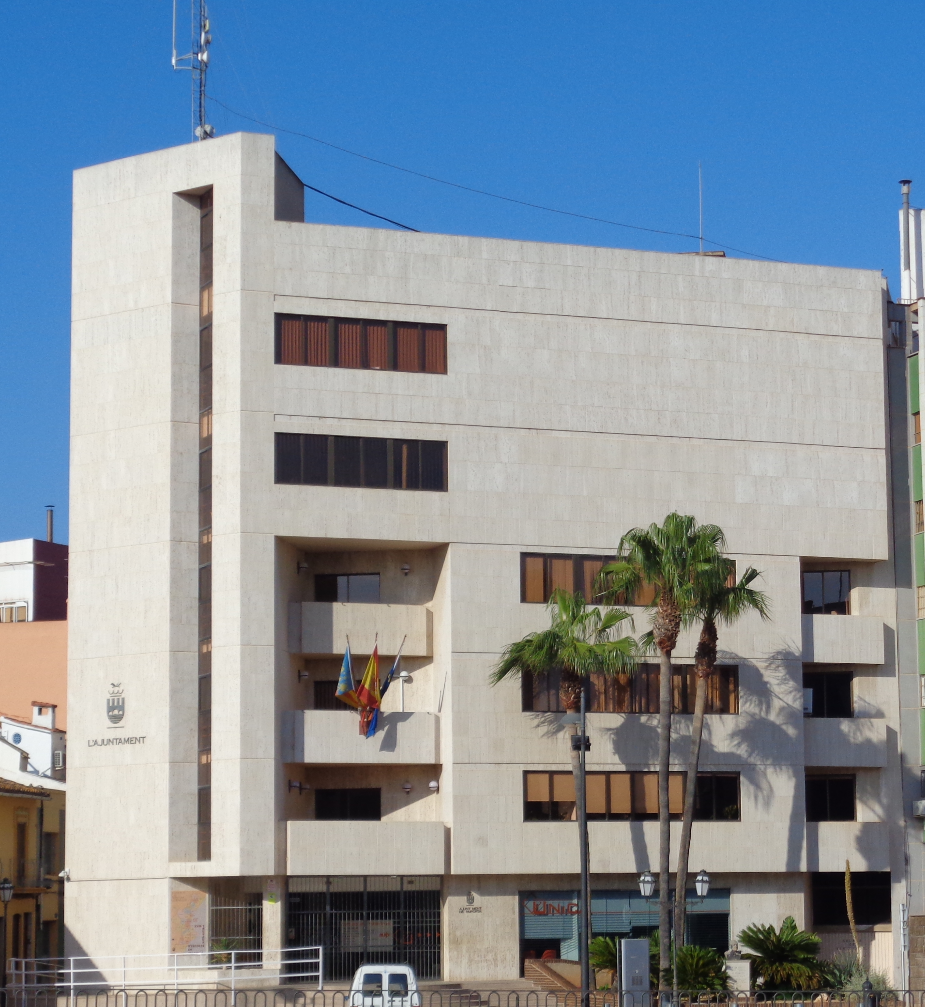 Paiporta.